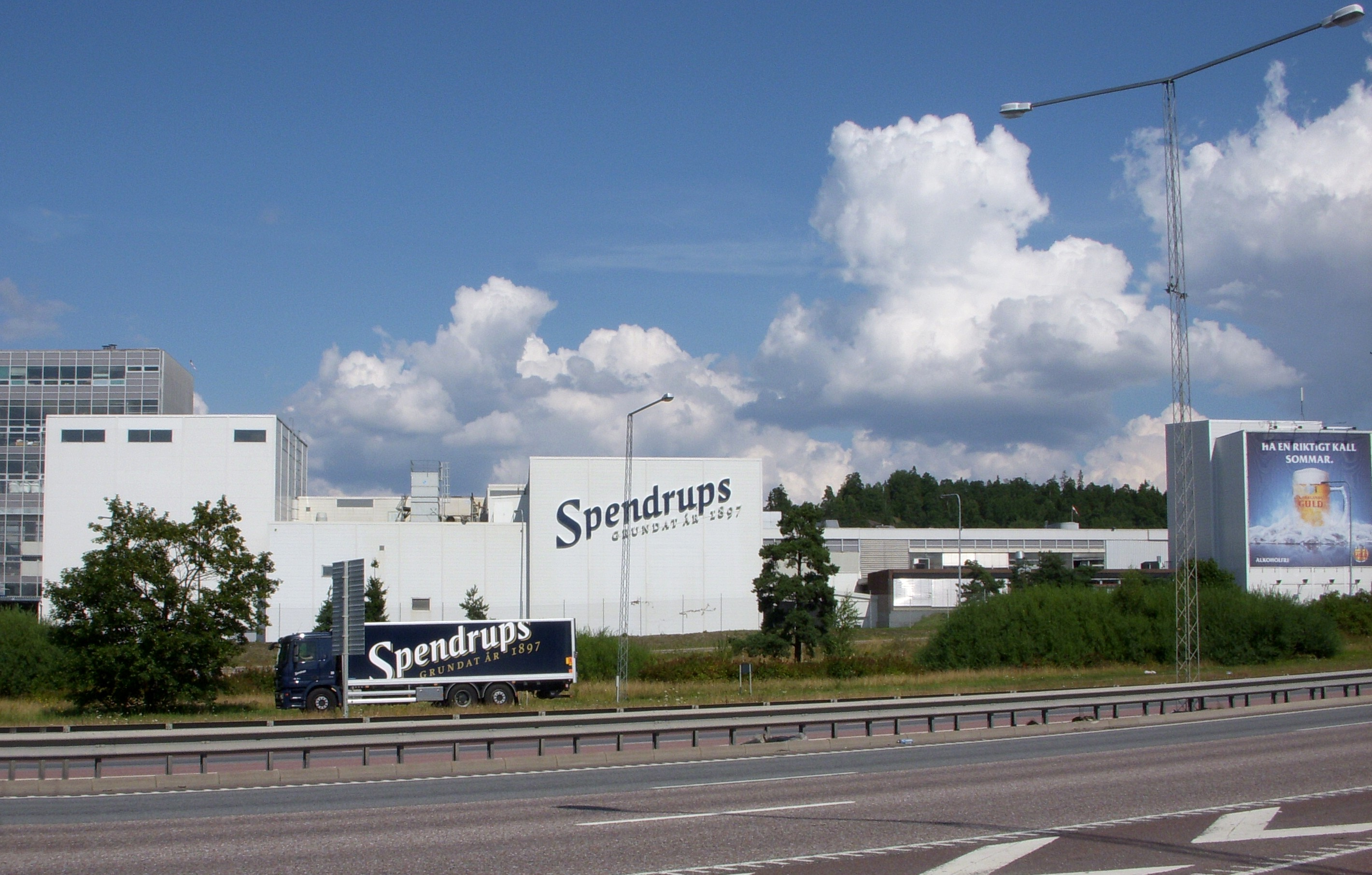 Spendrups bryggerier i Vårby, Huddinge